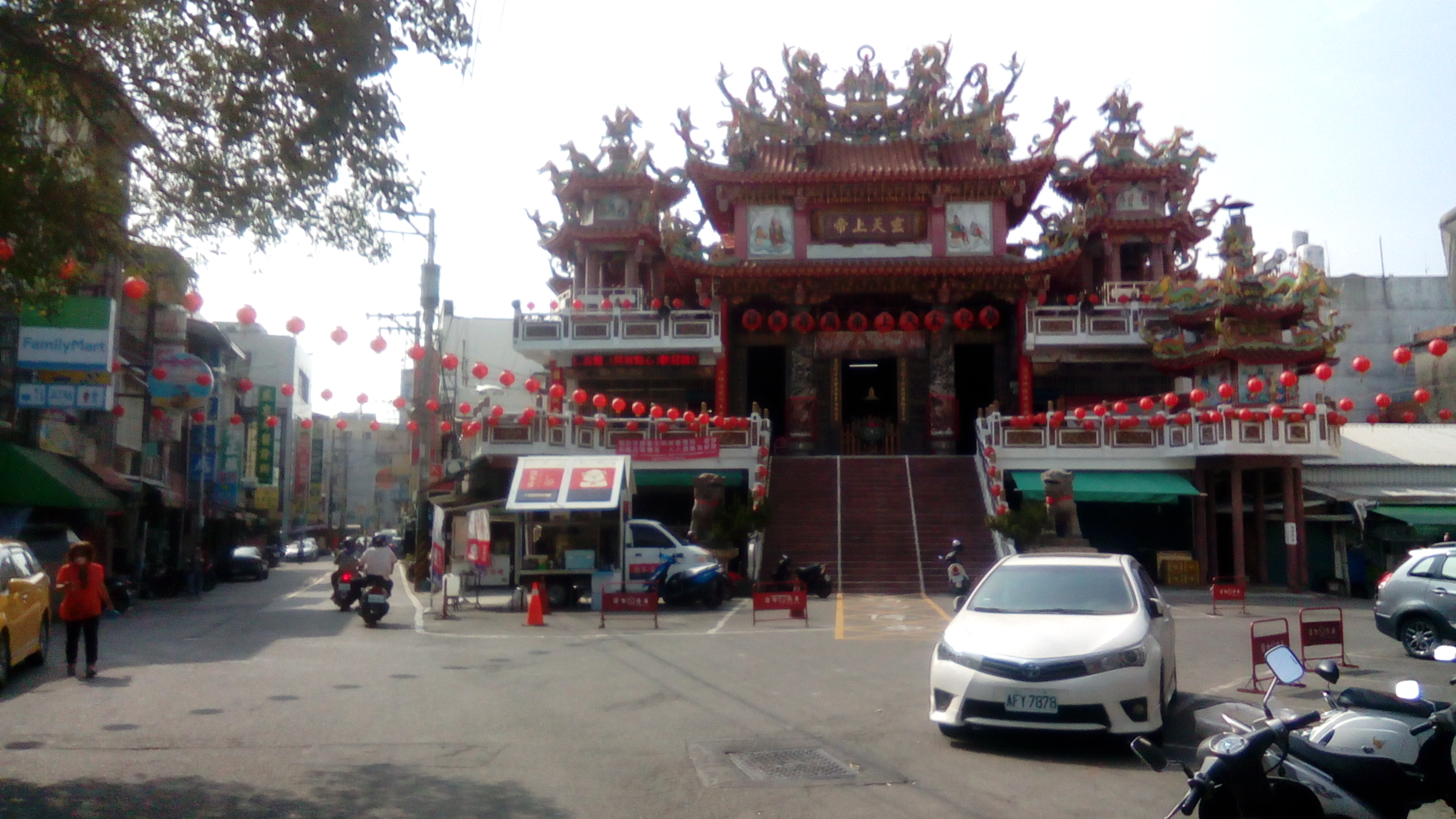 位於燕巢區市中心